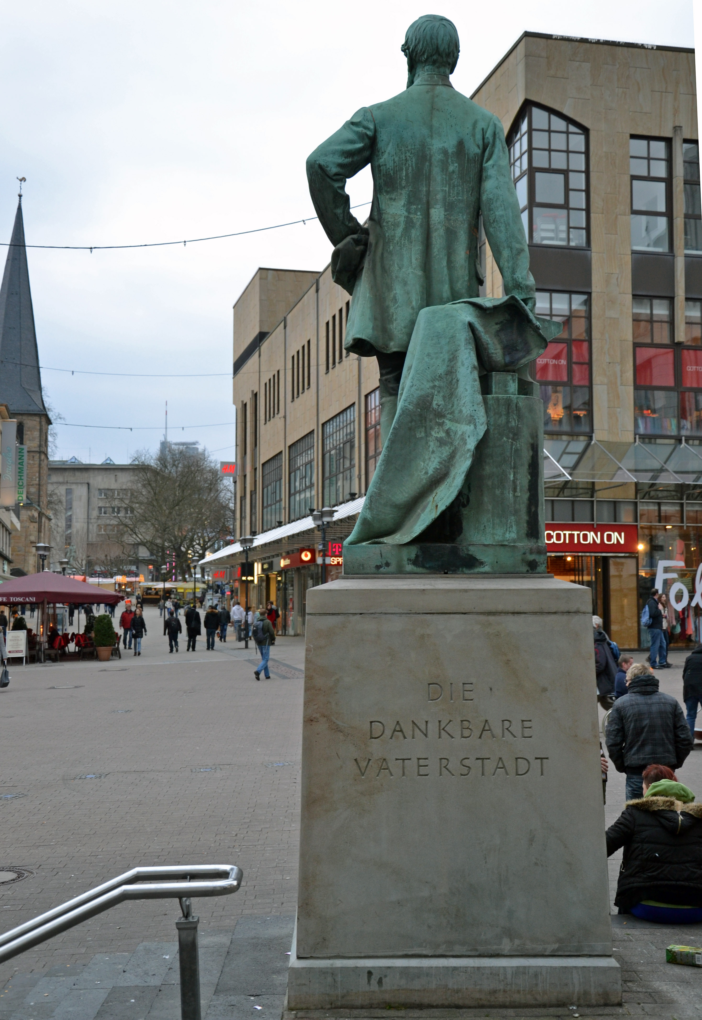 Alfred-Krupp-Denkmal in Essen, Rückseite mit Inschrift "Die dankbare Vaterstadt"